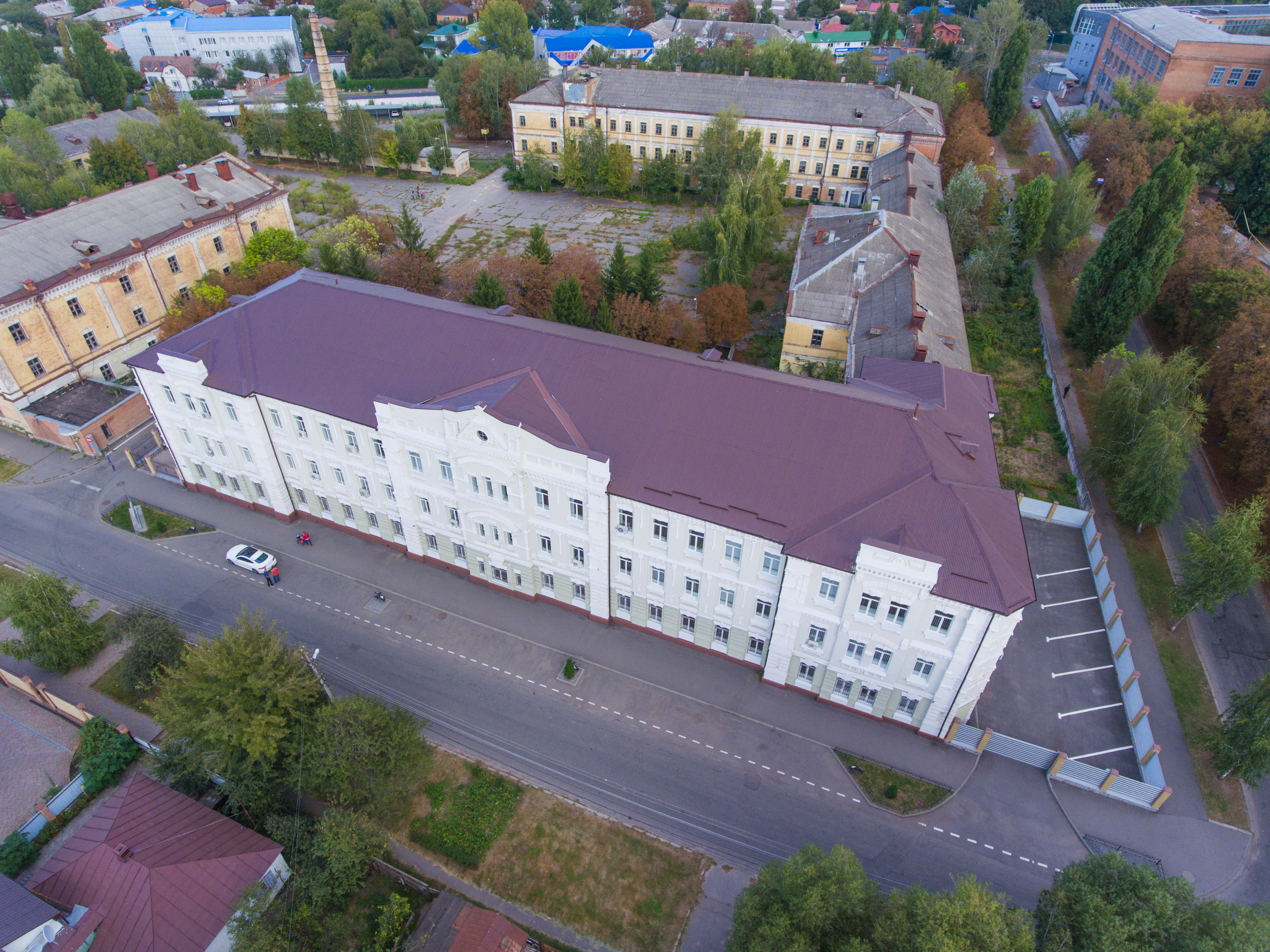 Полтавський окружний адміністративний суд (Червоні казарми), Полтава, вул. Пушкарівська, 9/26